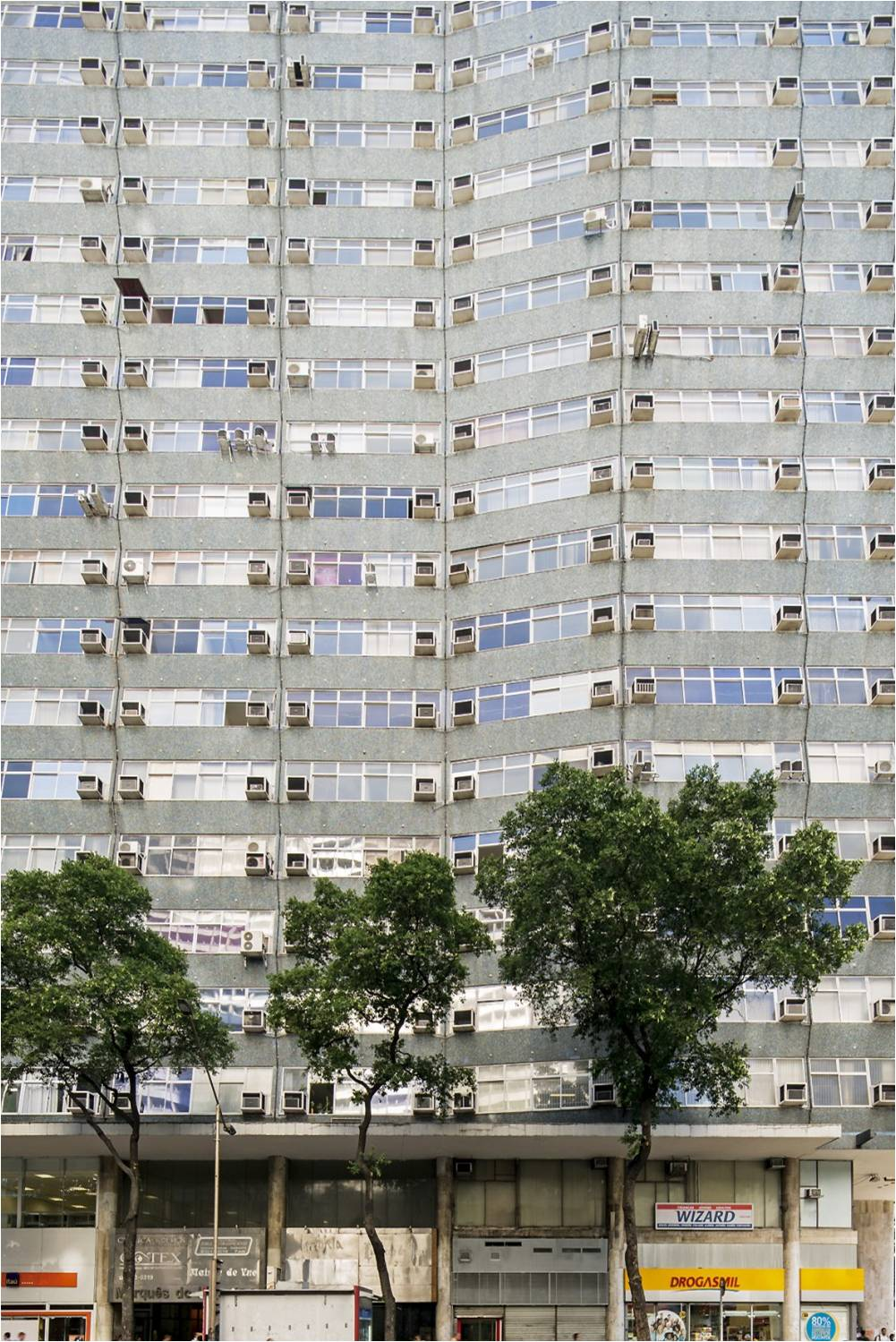 RIO DE JANEIRO (RJ). Edifício Marquês do Herval (Avenida Rio Branco, 156 - Centro). Sua fachada parece ser formada por "ondas". Inaugurado em 1952, o edifício modernista de escritórios se situa em uma das avenidas mais movimentadas do Centro do Rio. Projeto dos irmãos arquitetos M.M.M. Roberto - Marcelo (1908 - 1964), Milton (1914-1953) e Maurício (1921-1996).